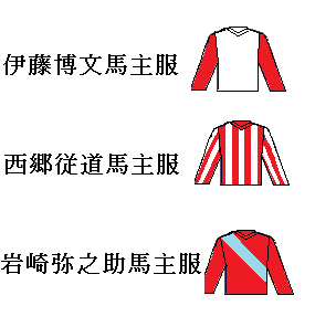 明治 競馬での馬主服の一例